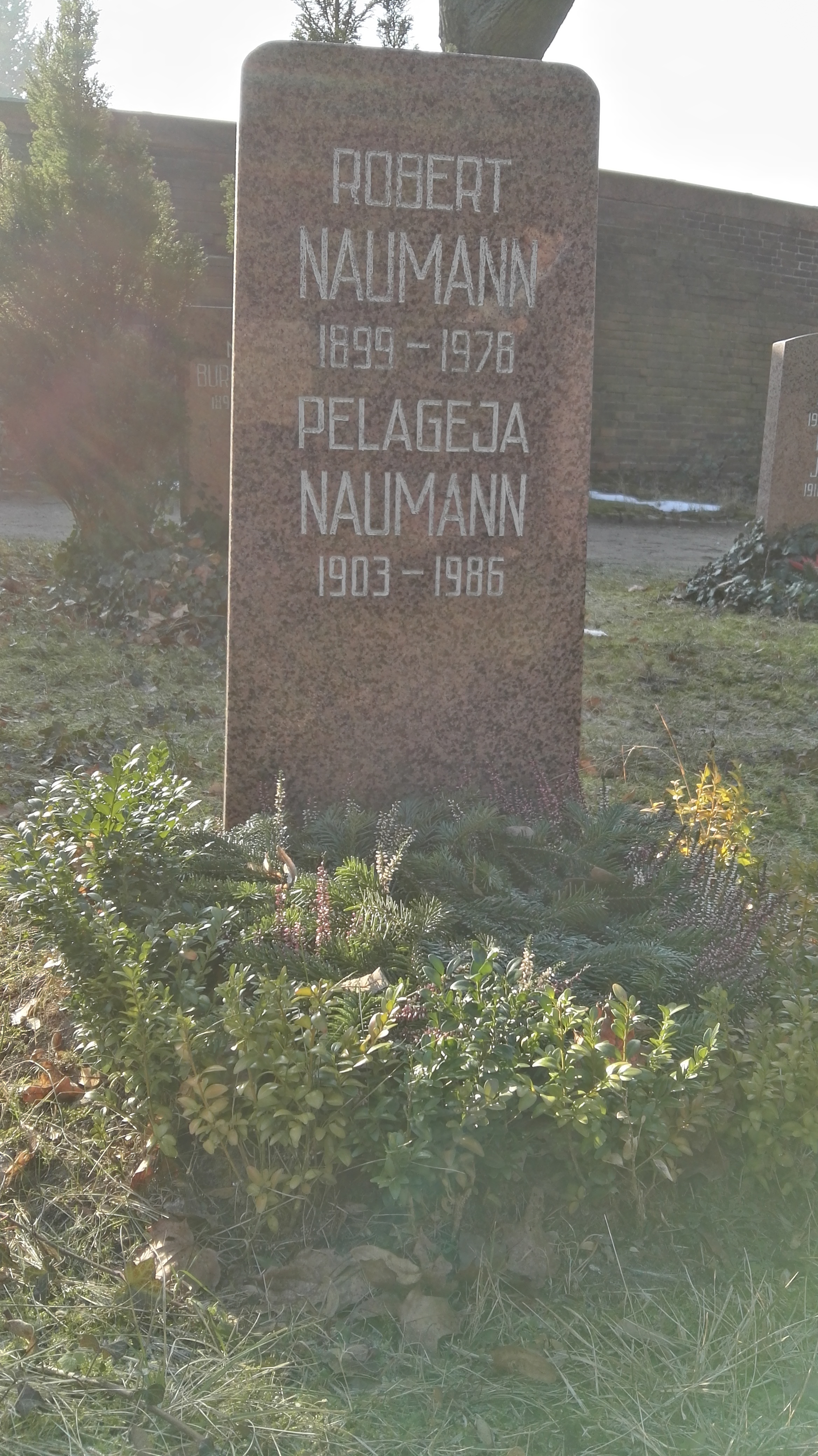 Grab von Robert Naumann und Pelageja Naumann in der Grabanlage Pergolenweg auf dem Sozialistenfriedhof des Zentralfriedhofs Friedrichsfelde